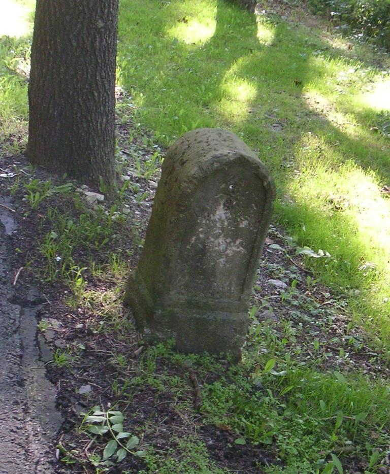 kgl.-sächs. Halbmeilenstein in Holzhau